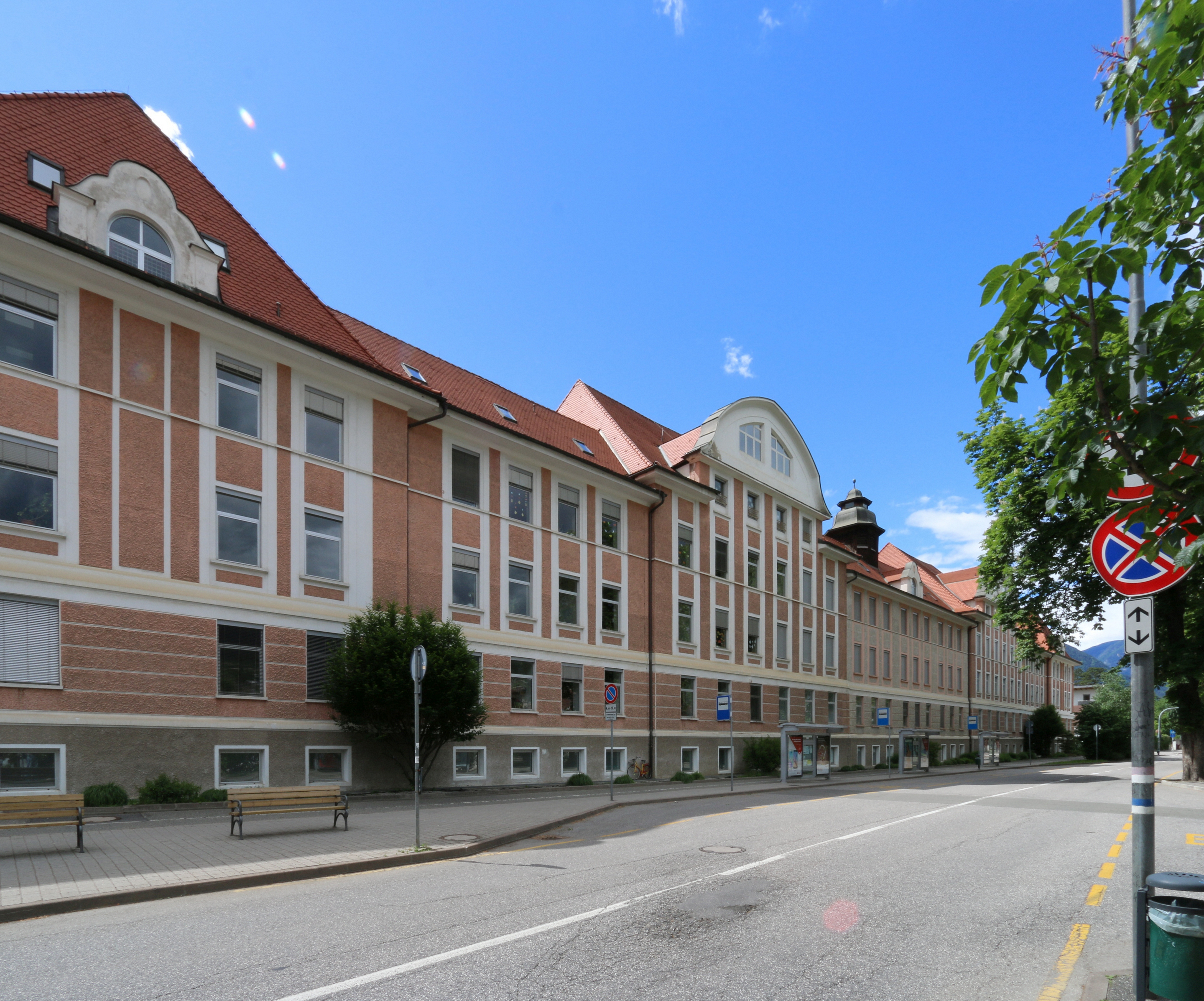 Brixen, Südtirol: Mittelschule Oswald von Wolkenstein (ehem. Kaiser-Karl-Kaserne)